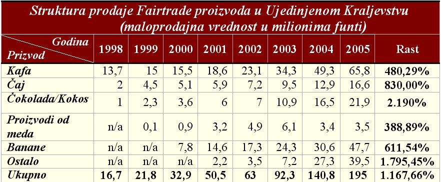 "Serbian:"Struktura prodaje Fairtrade proizvoda u Ujedinjenom Kraljevstvu tabla2005.jpg